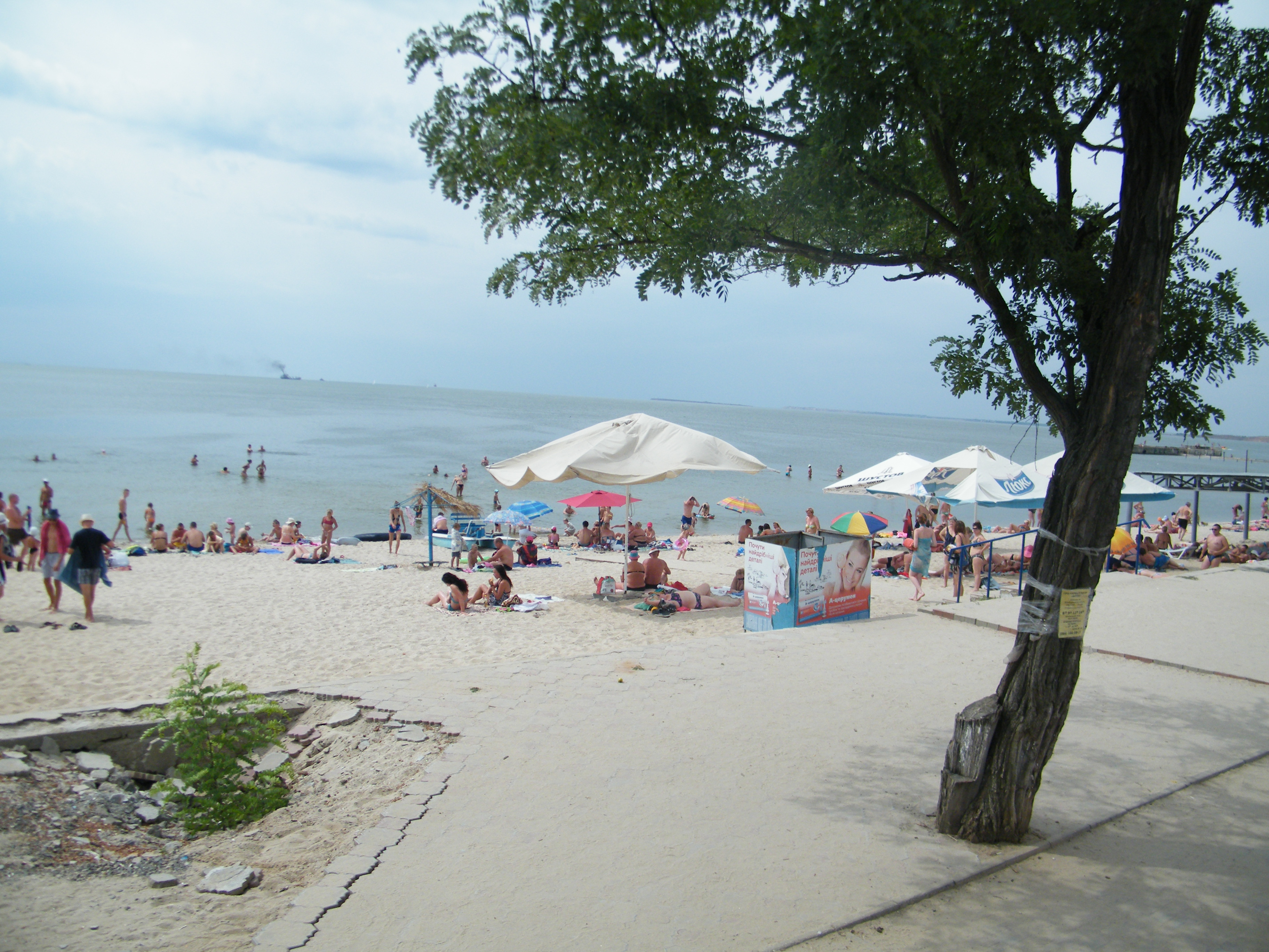 Очаківський пляж